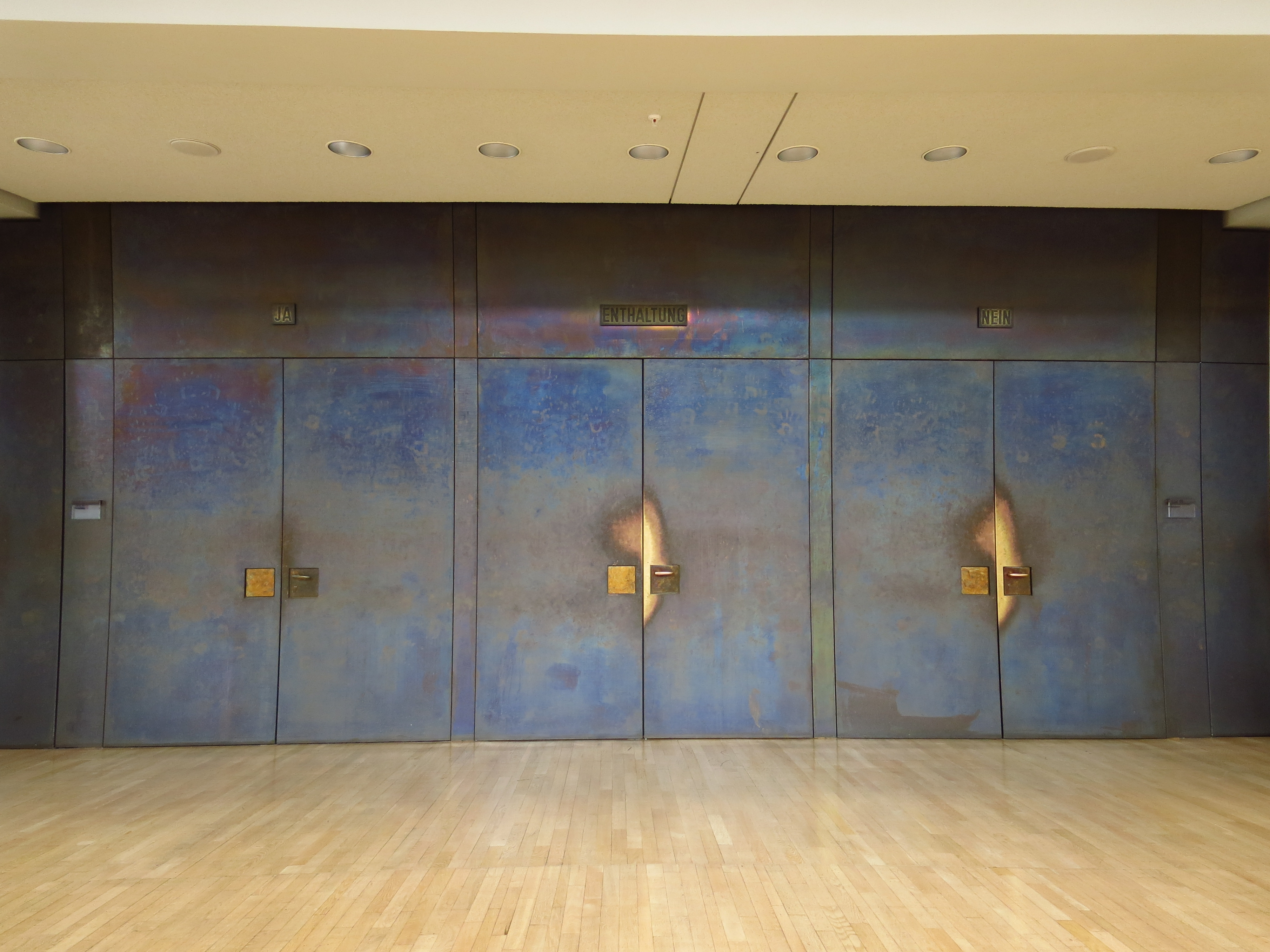 Innenbereich des Landtages Nordrhein-Westfalen